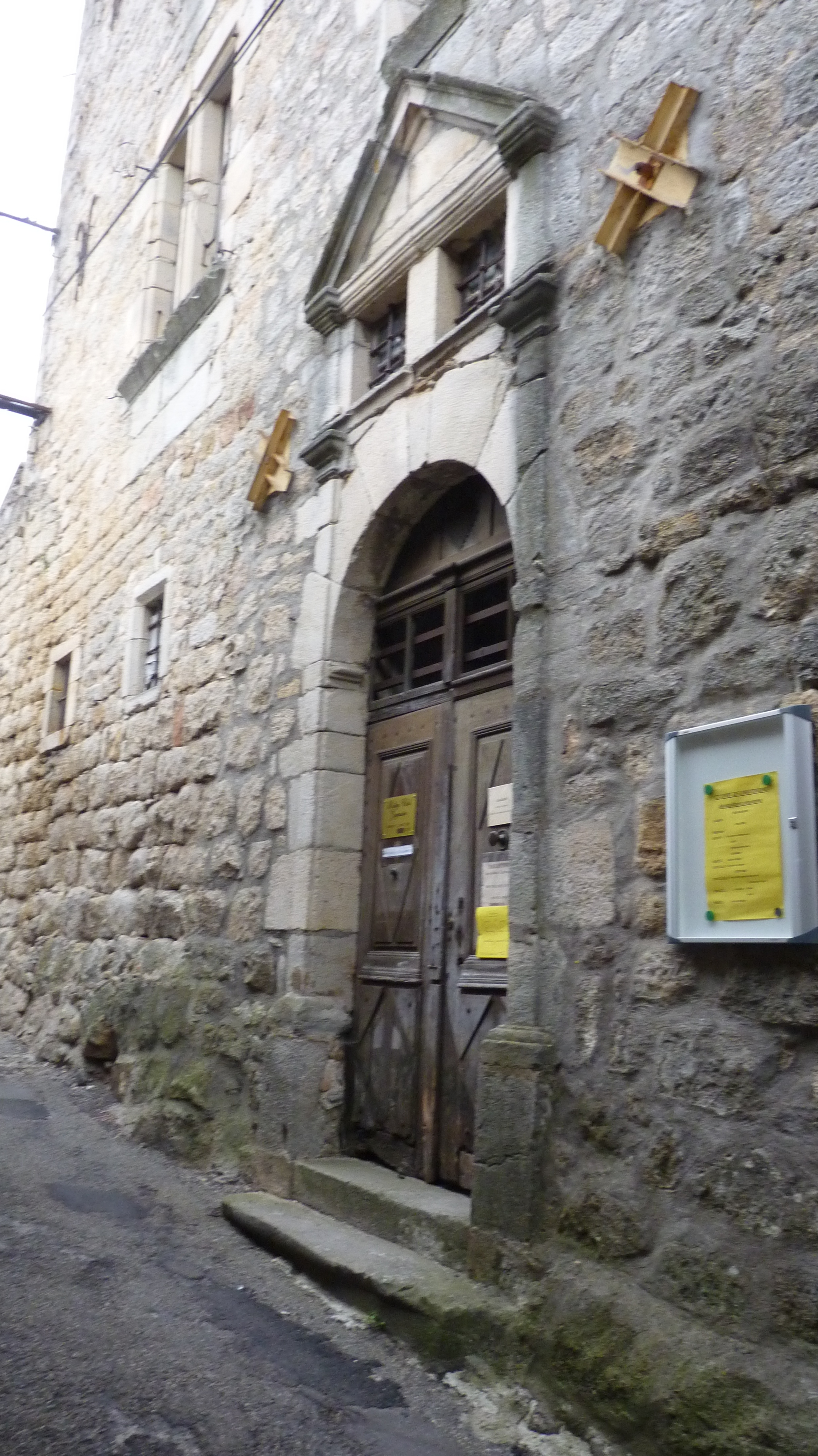 Joyeuse dans le département de l'Ardèche : portail du couvent des Oratoriens, actuellement maison des Associations.